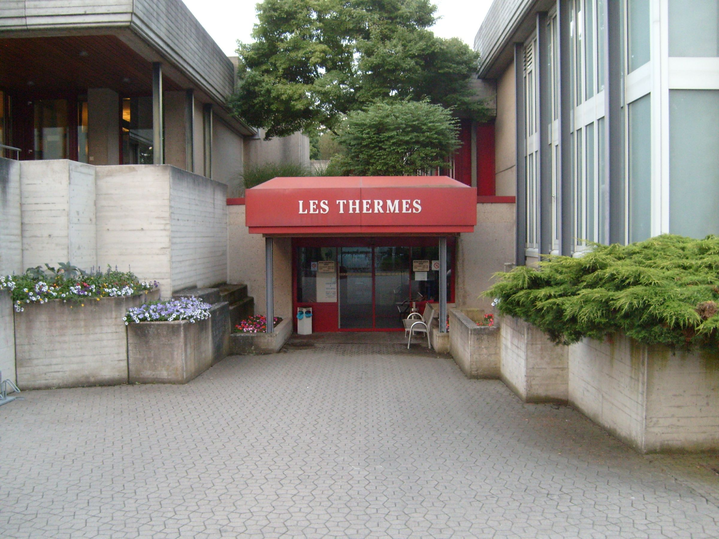 D'Entrée fir d'Kuristen. 21. Juni 2008. Munneref Les Thermes + Kategorie:Gemeng Munneref